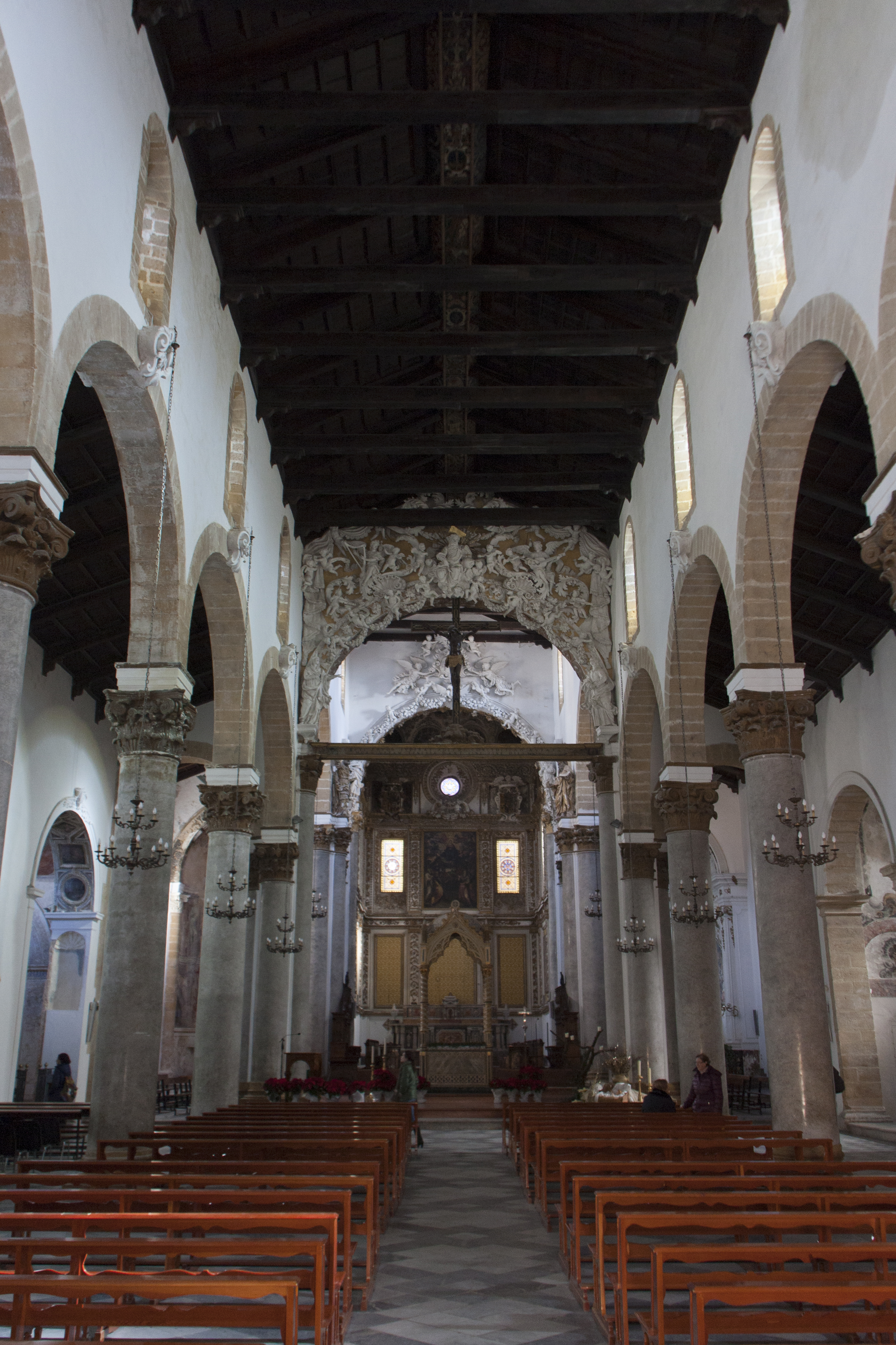 Chiesa Madre - Castelvetrano